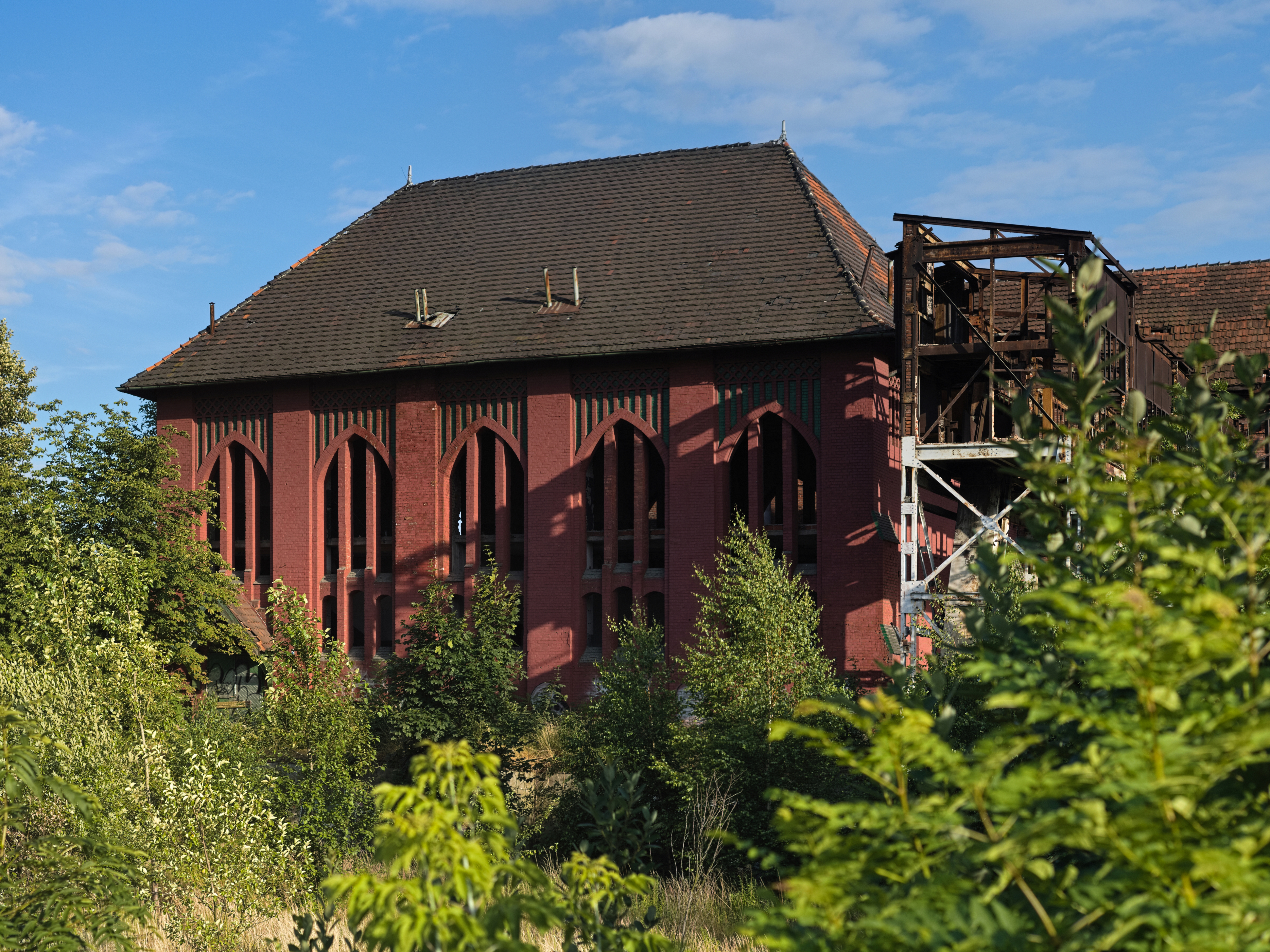 budynek maszyny wyciągowej szybu Bończyk (pierwotnie Mauve) kopalni węgla kamiennego Rozbark w Bytomiu, elewacja północna; projekt Emila i Georga Zillmannów